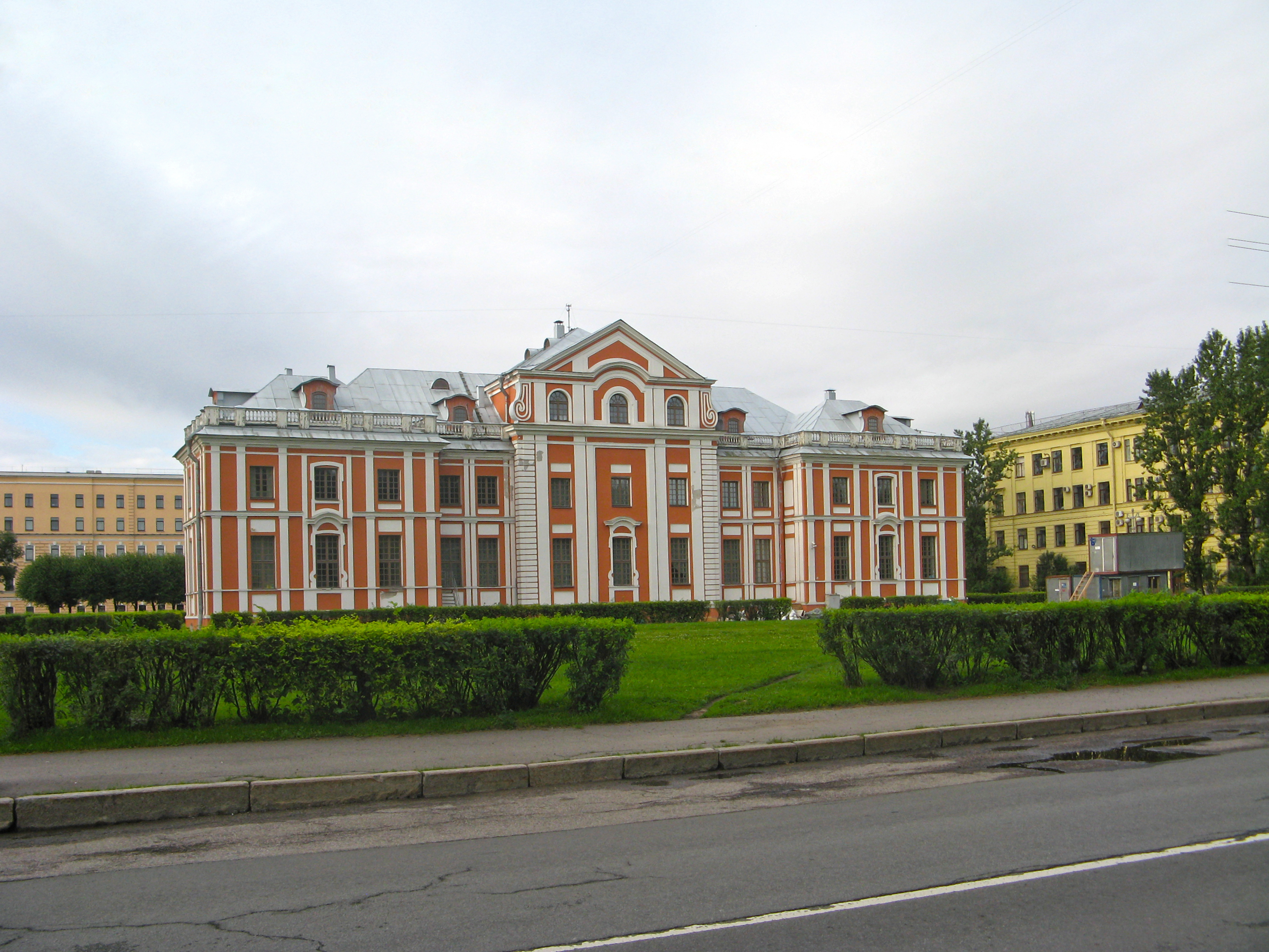 Палаты А.В. Кикина: Шпалерная улица, между домами 62 и 64, Ставропольская улица, 9, Центральный район, Санкт-Петербург